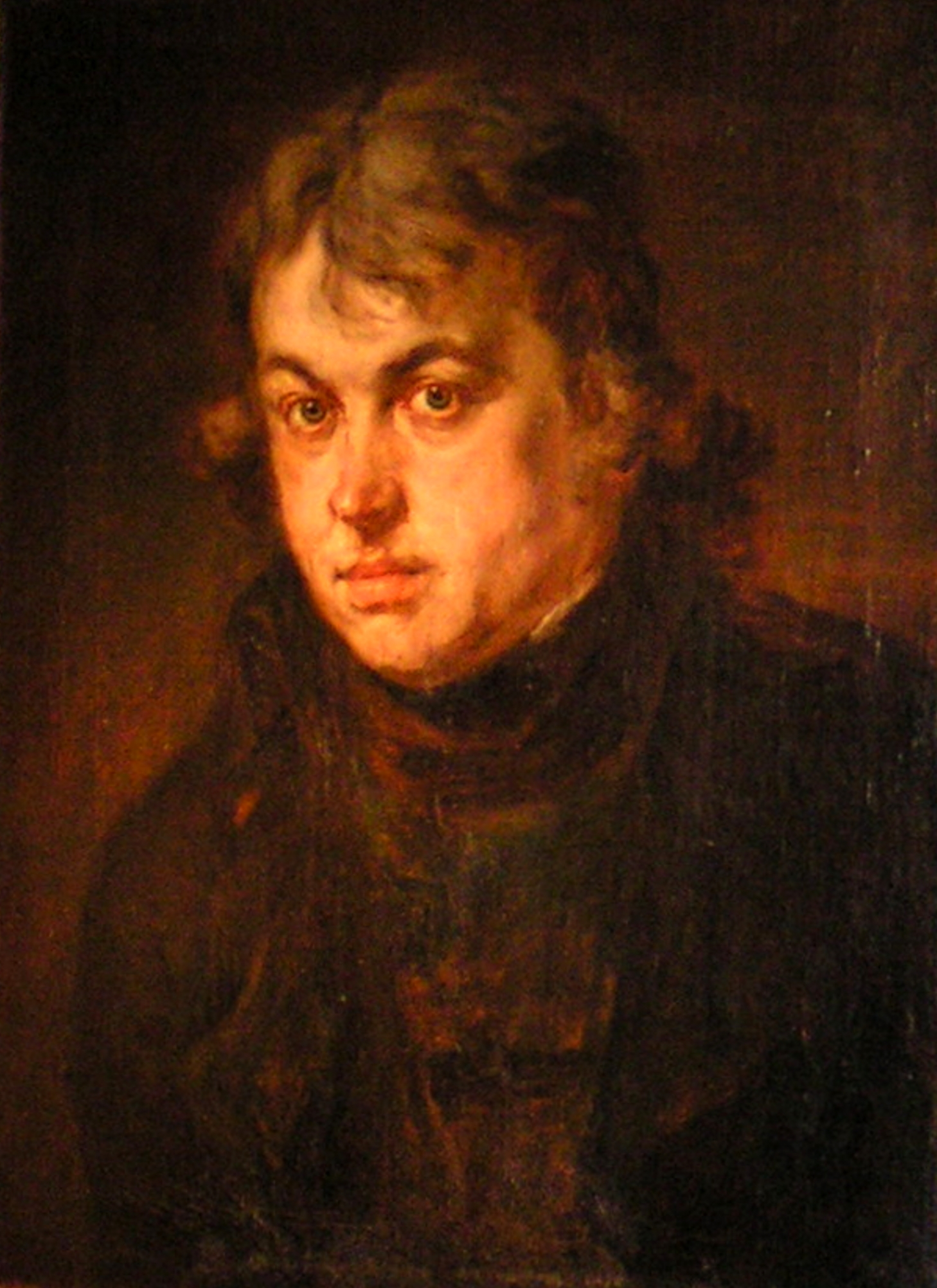 Joseph Ritter von Hazzi (* 12. Februar 1768 in Abensberg; † 20. Mai 1845 in Schloss Elkofen) war Jurist und bayerischer Beamter